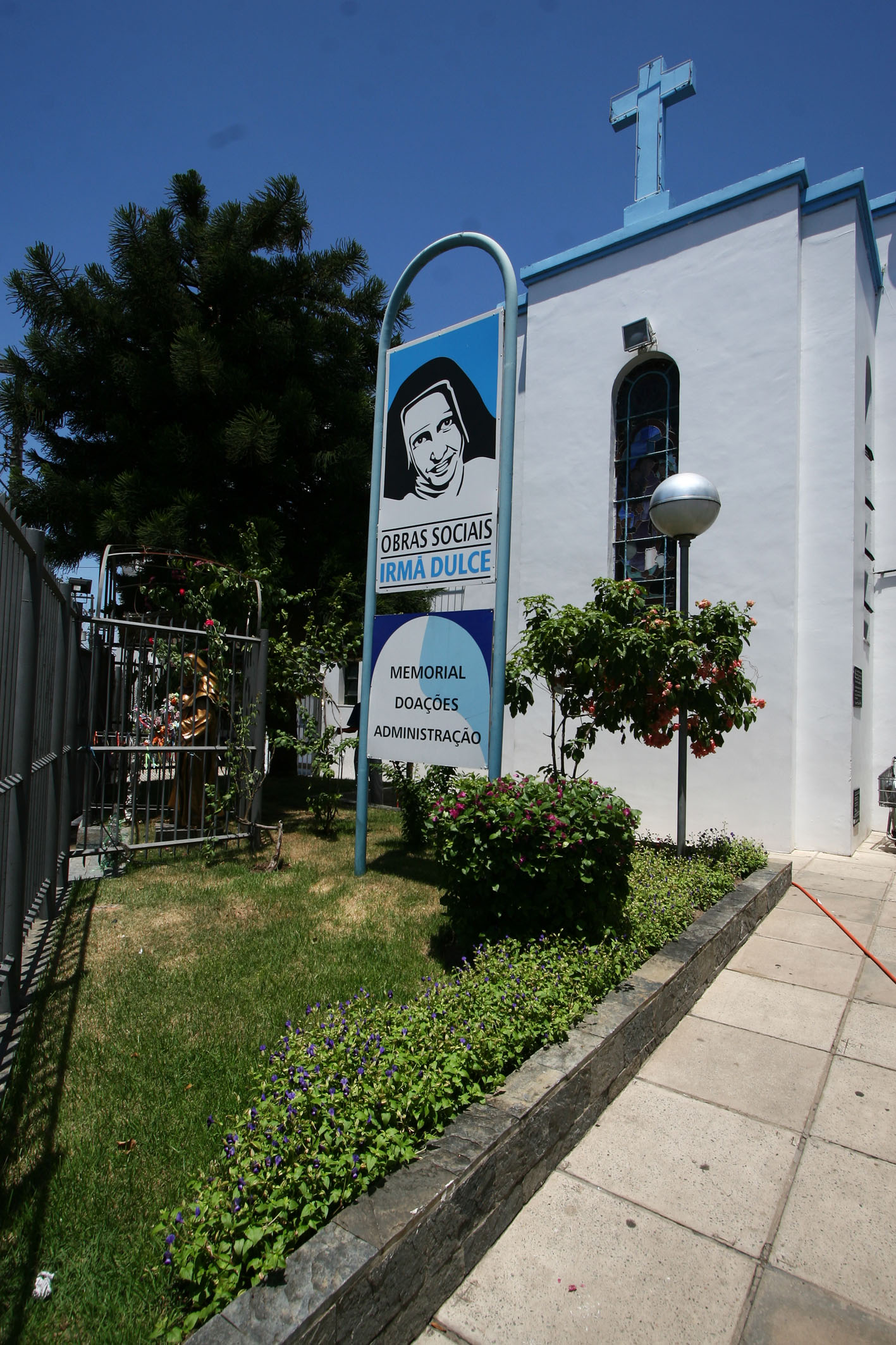 Apresentação do projeto de Beatificação de Irmã Dulce Na foto: Obras Sociais Irmã Dulce Autora: Carol Garcia / AGECOM